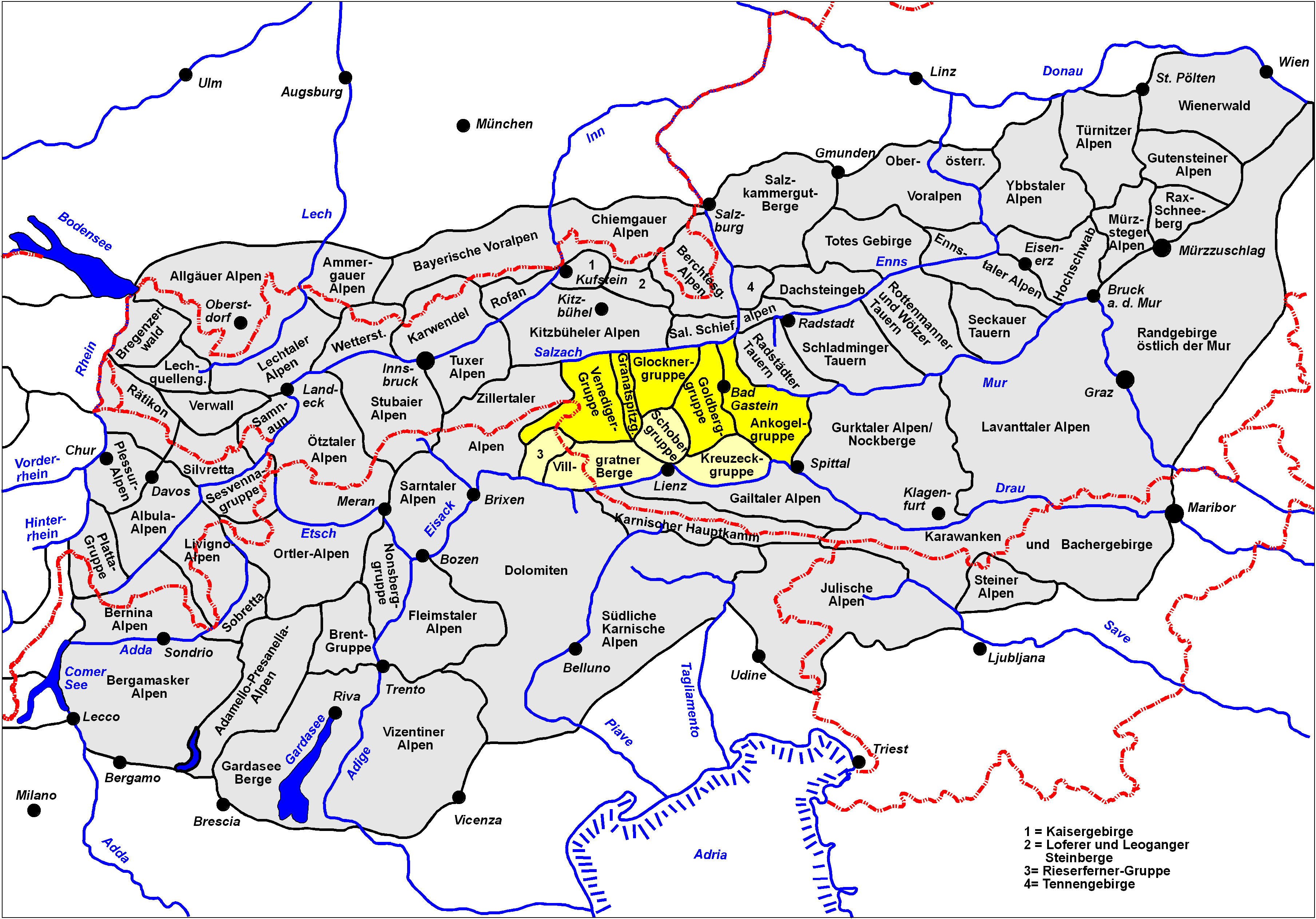 Hohe Tauern mit südlich vorgelagerter Gebirgsgruppe